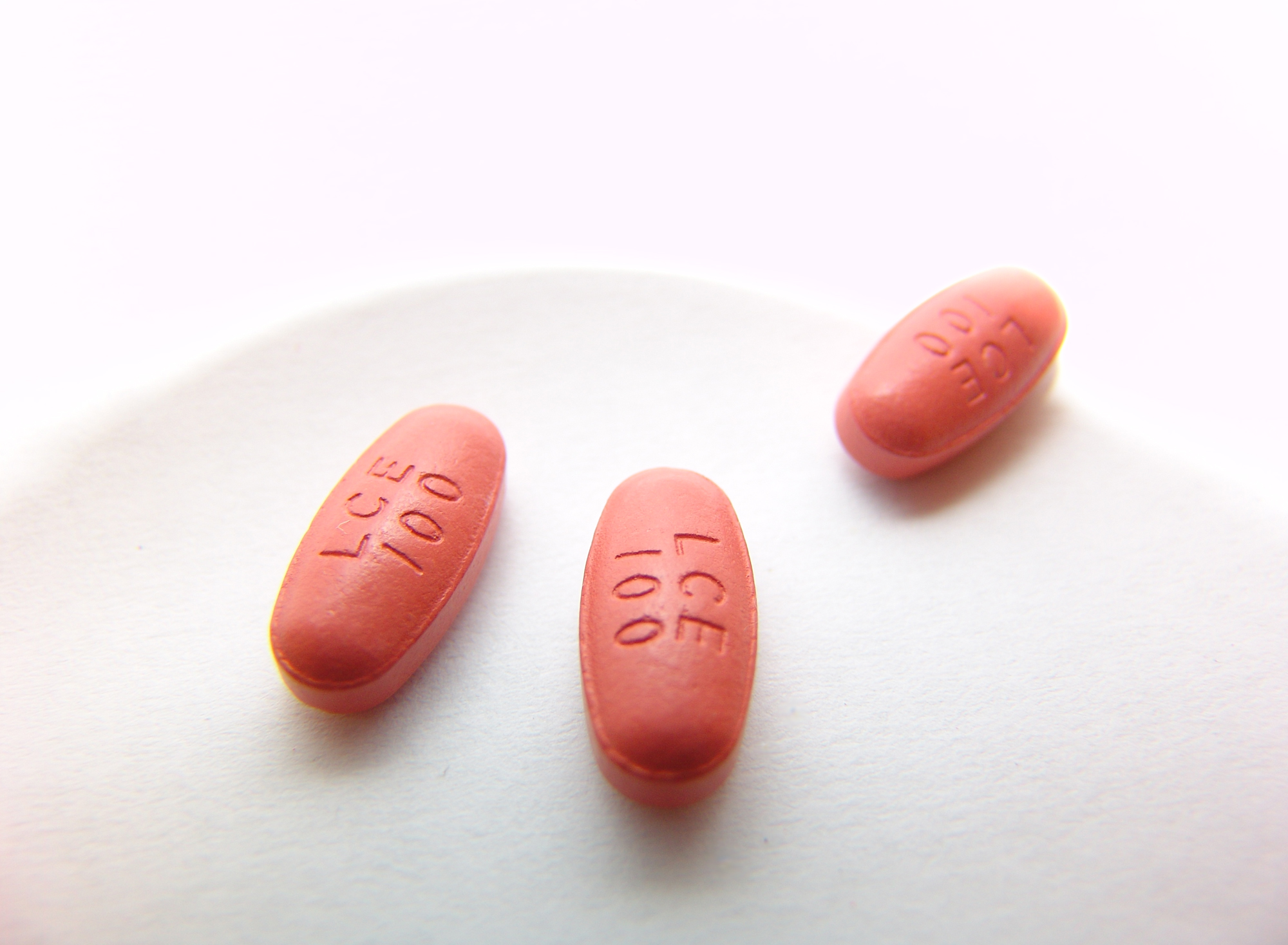 Präparat zur Therapie der Parkinson Krankheit, Stalevo